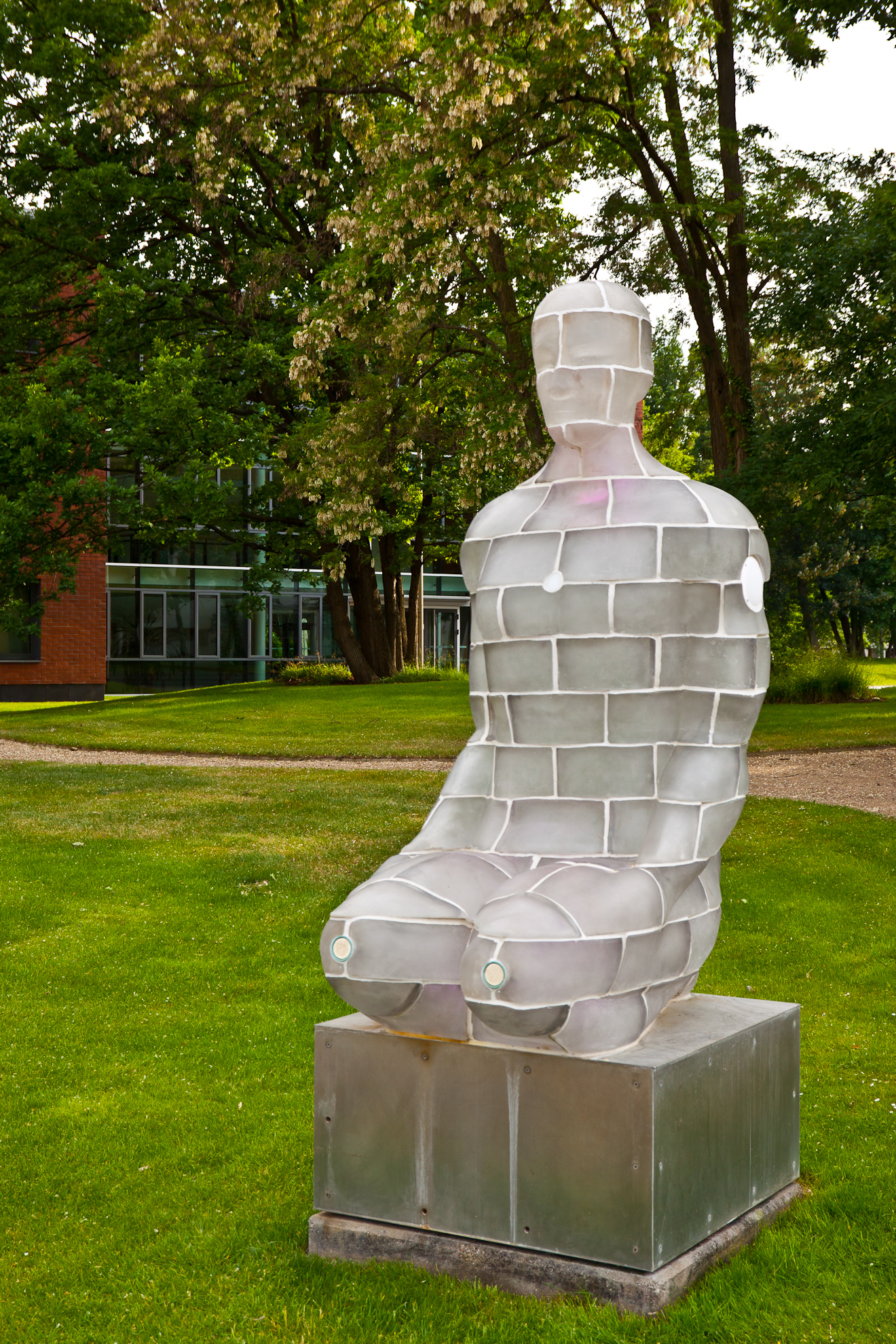 Interaktive Skulptur "Mr. Net" auf dem Campus des Hasso-Plattner-Instituts Potsdam